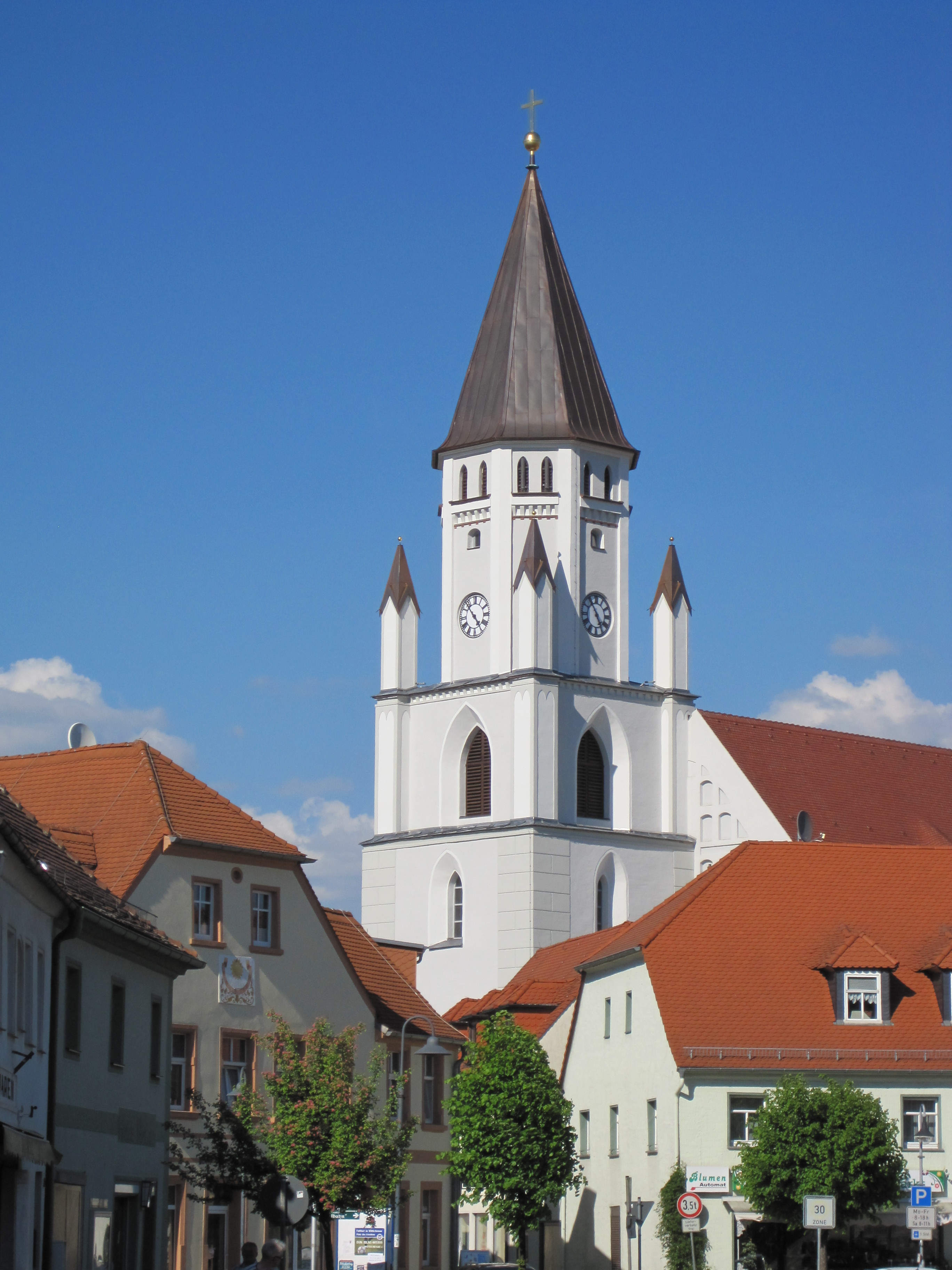 Ansicht der Pfarrkirche Wittichenau von Südwest nach Nordost Hornjoserbsce: Napohlad Kulowskeje wosadneje cyrkwje z juhozapada